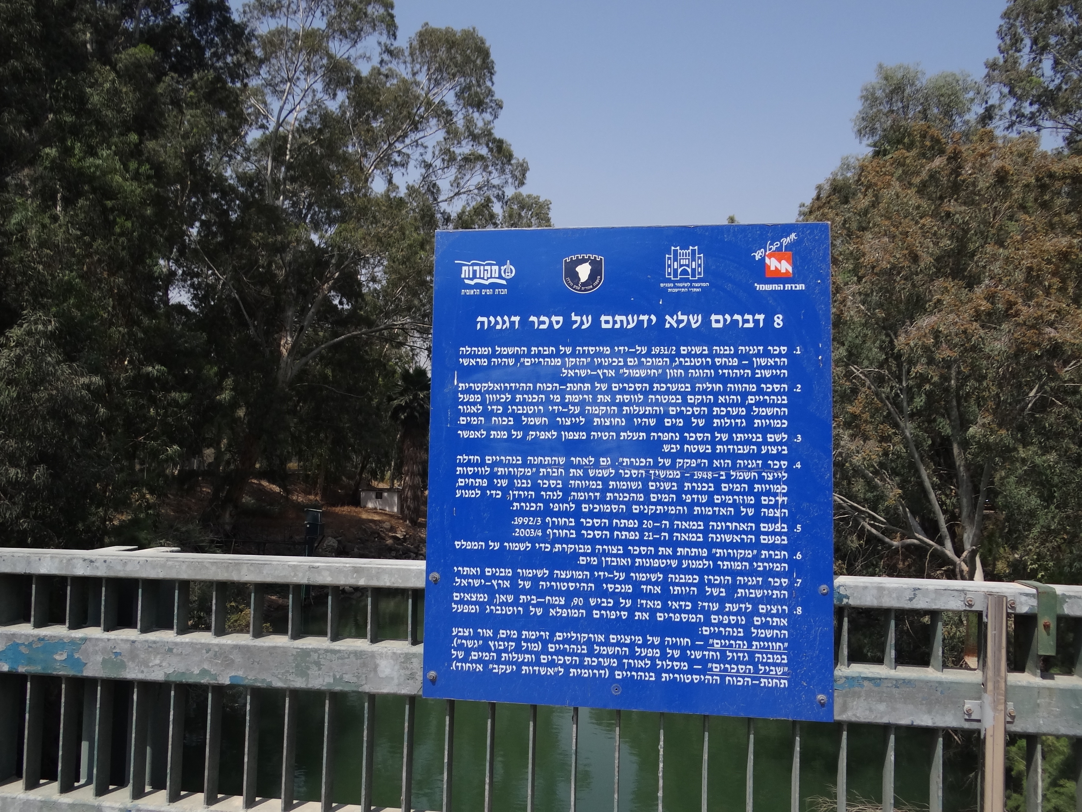 Dgania dam on Jordan river סכר דגניה על הירדן